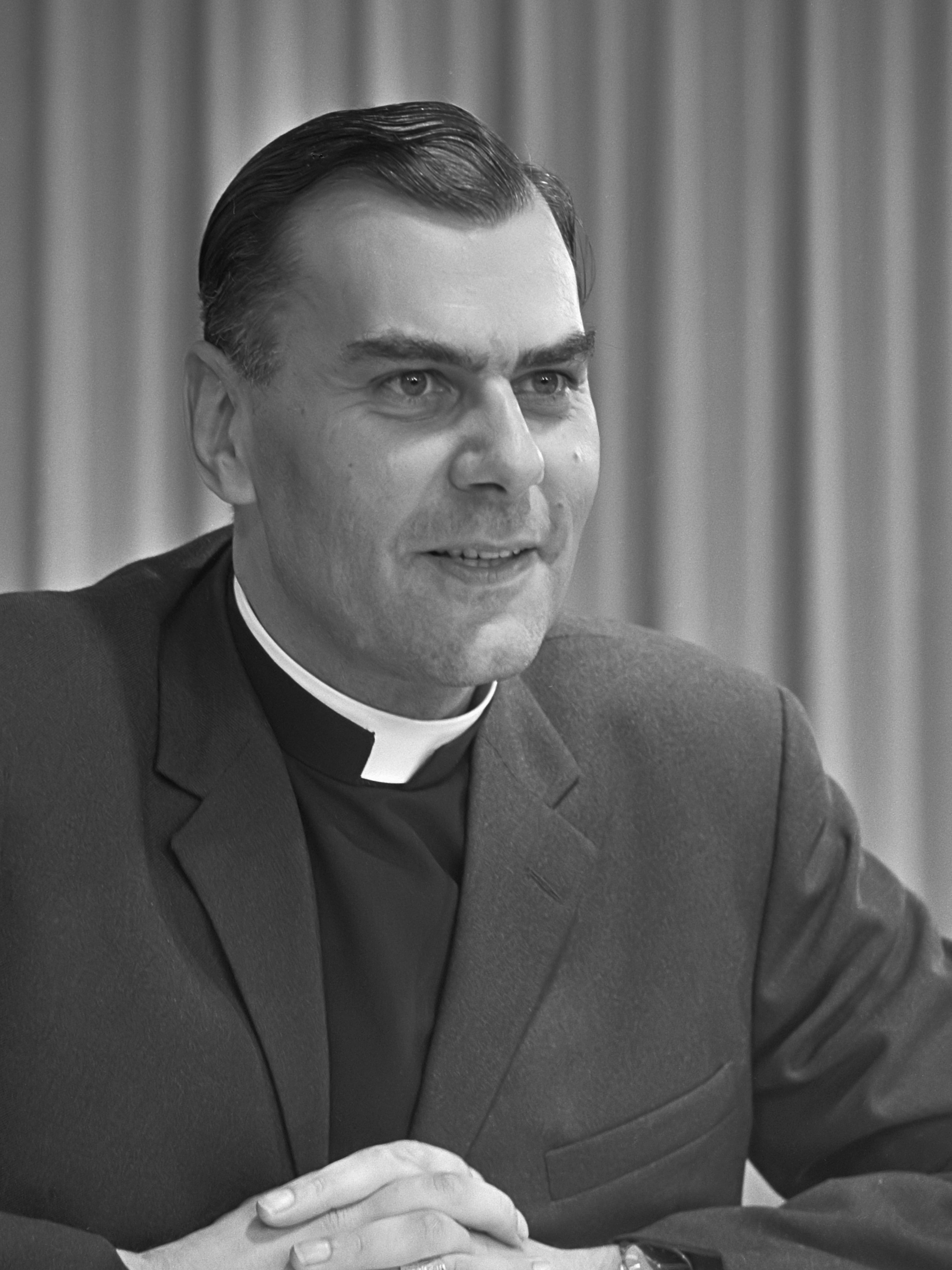 Mgr. Bluyssen terug uit Rome mgr. Bluyssen (kop) tijdens persconferentie